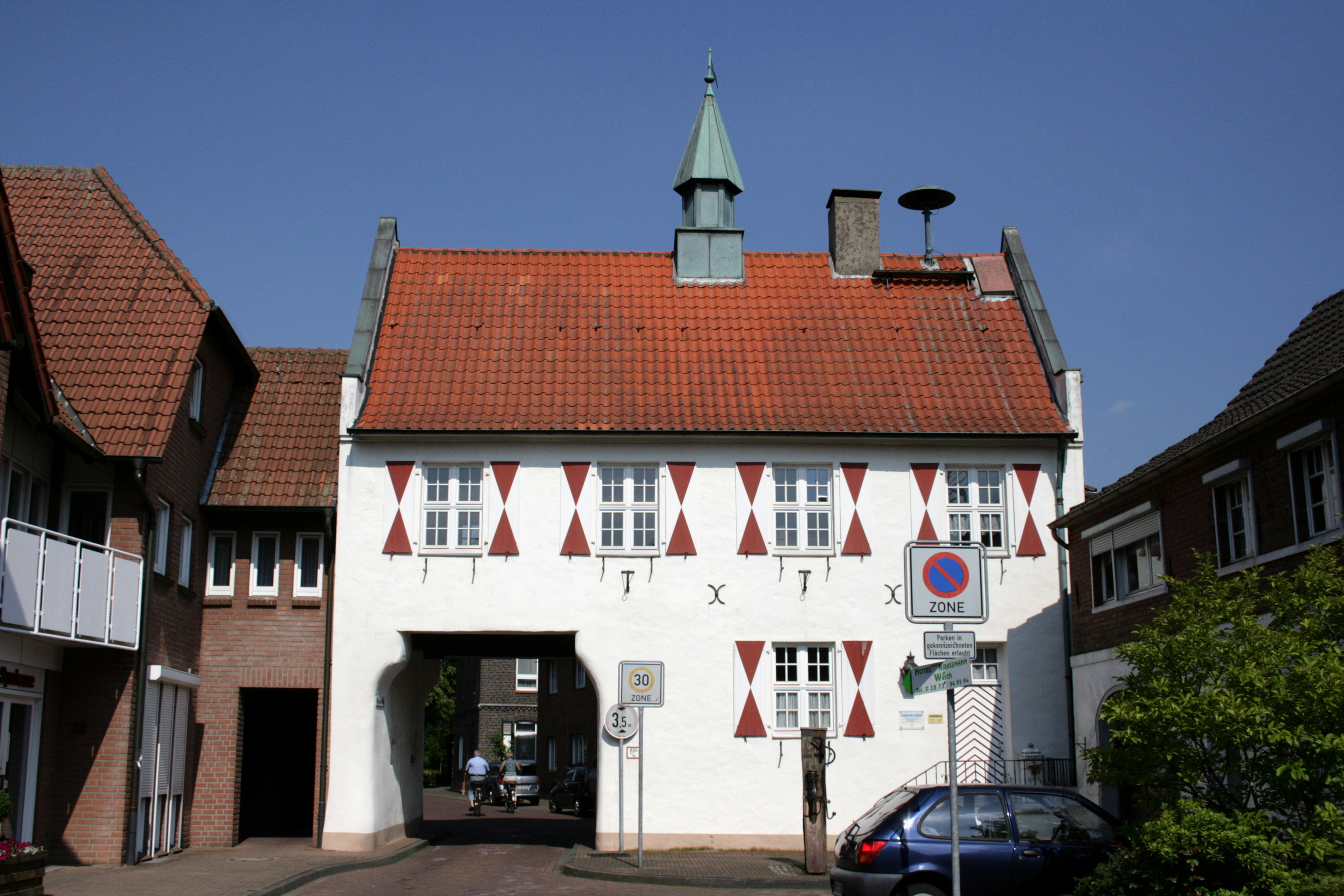 Ehemaliges Torhaus der Burg Werth, historisches Rathaus Isselburg